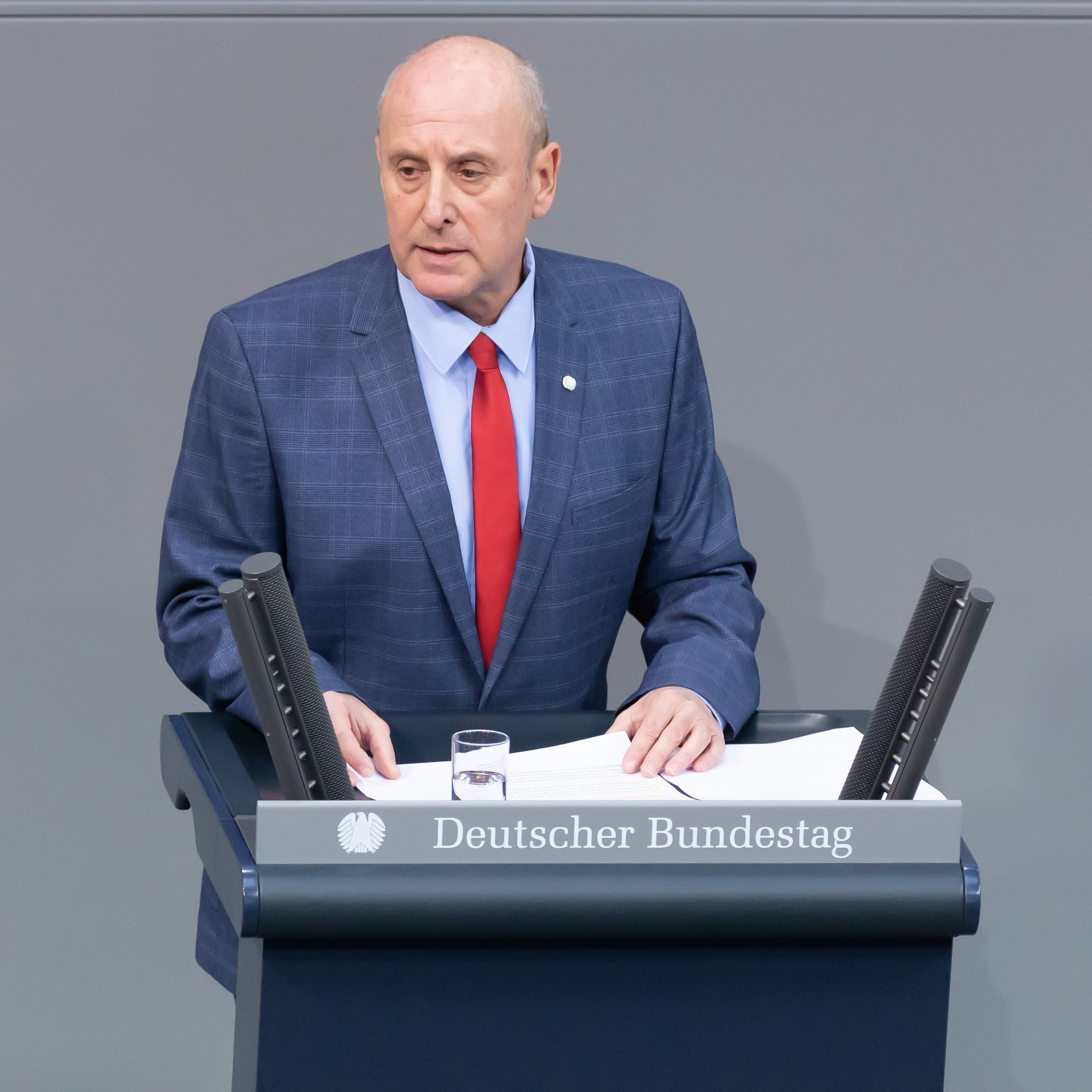 Deutscher Bundestag; Michael Gerdes, SPD, spricht im Plenum